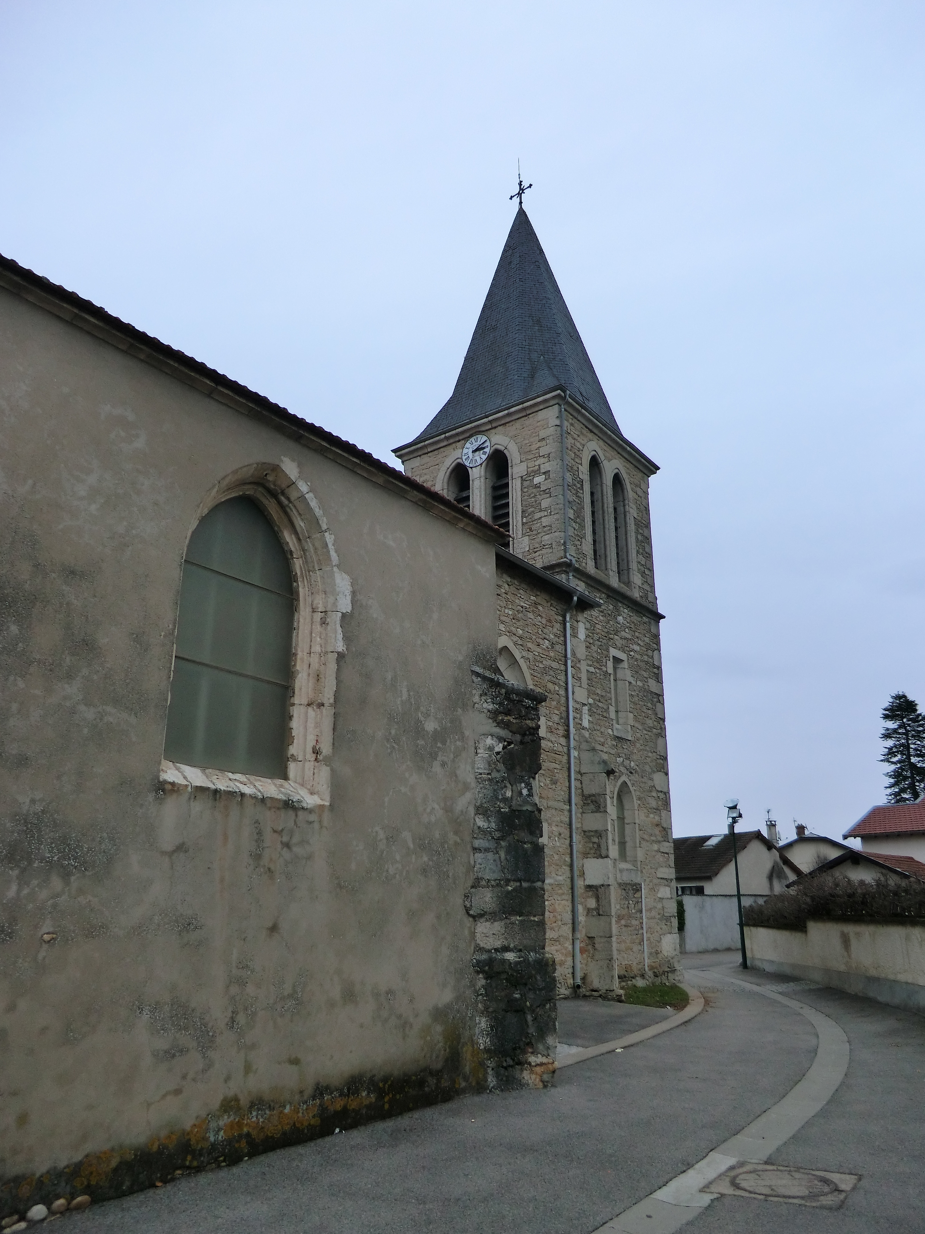 L'église Saint-Jean-Baptiste de Balan (Ain).